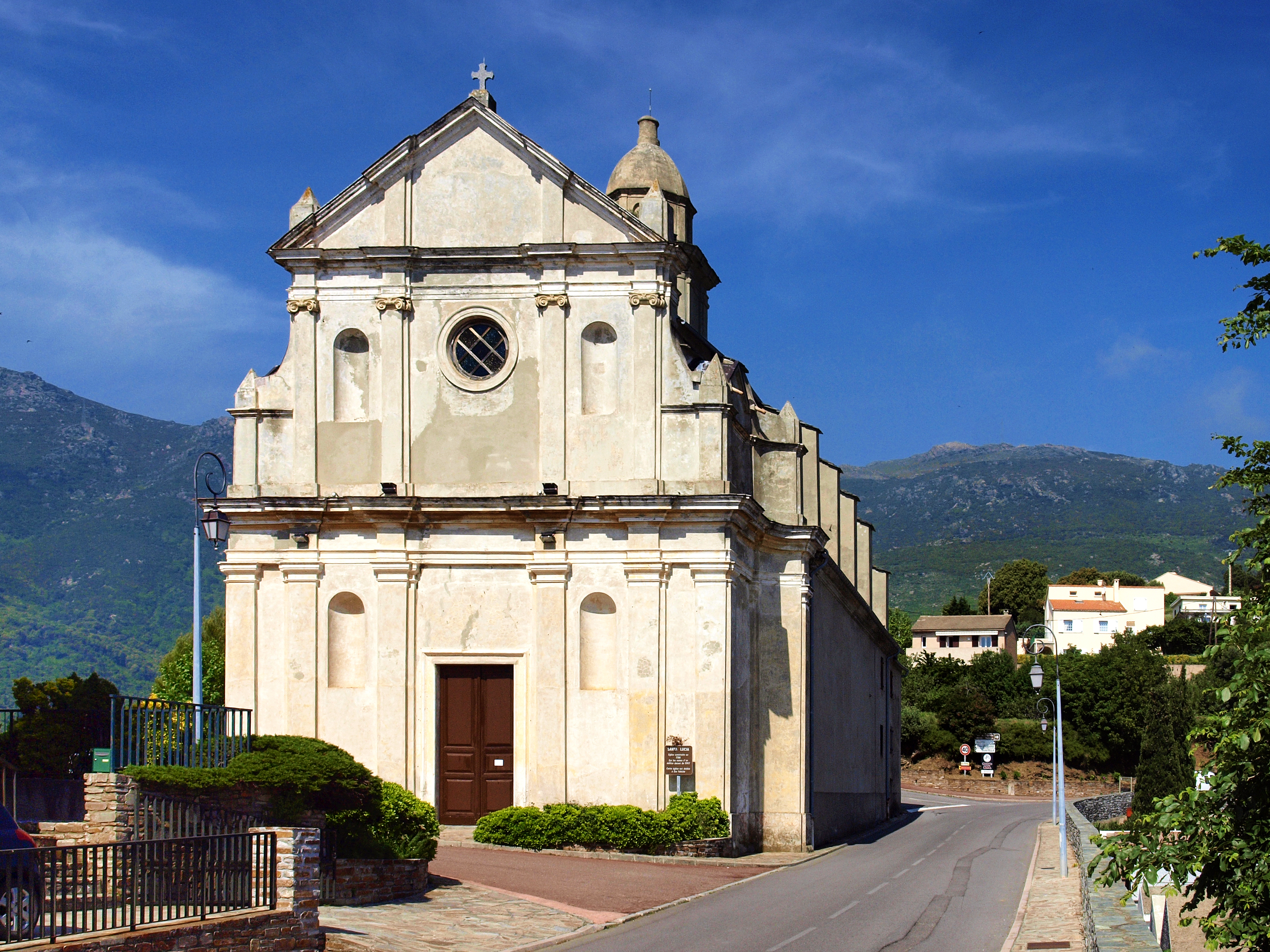 Ville-di-Pietrabugno (Corsica) - Santa Lucia, église paroissiale